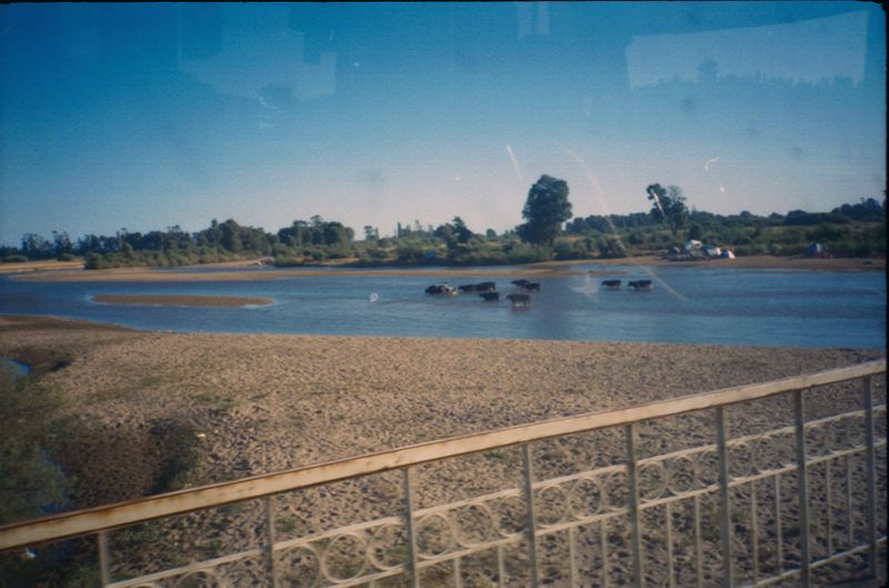 Kendi fotom telif sorunu yok